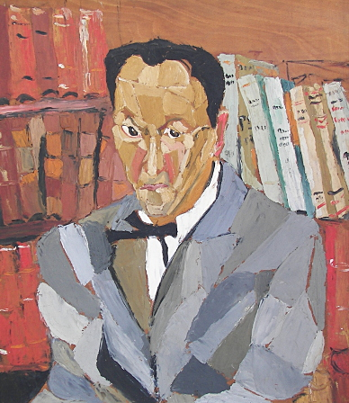 Portrait de l'écrivain André Salmon